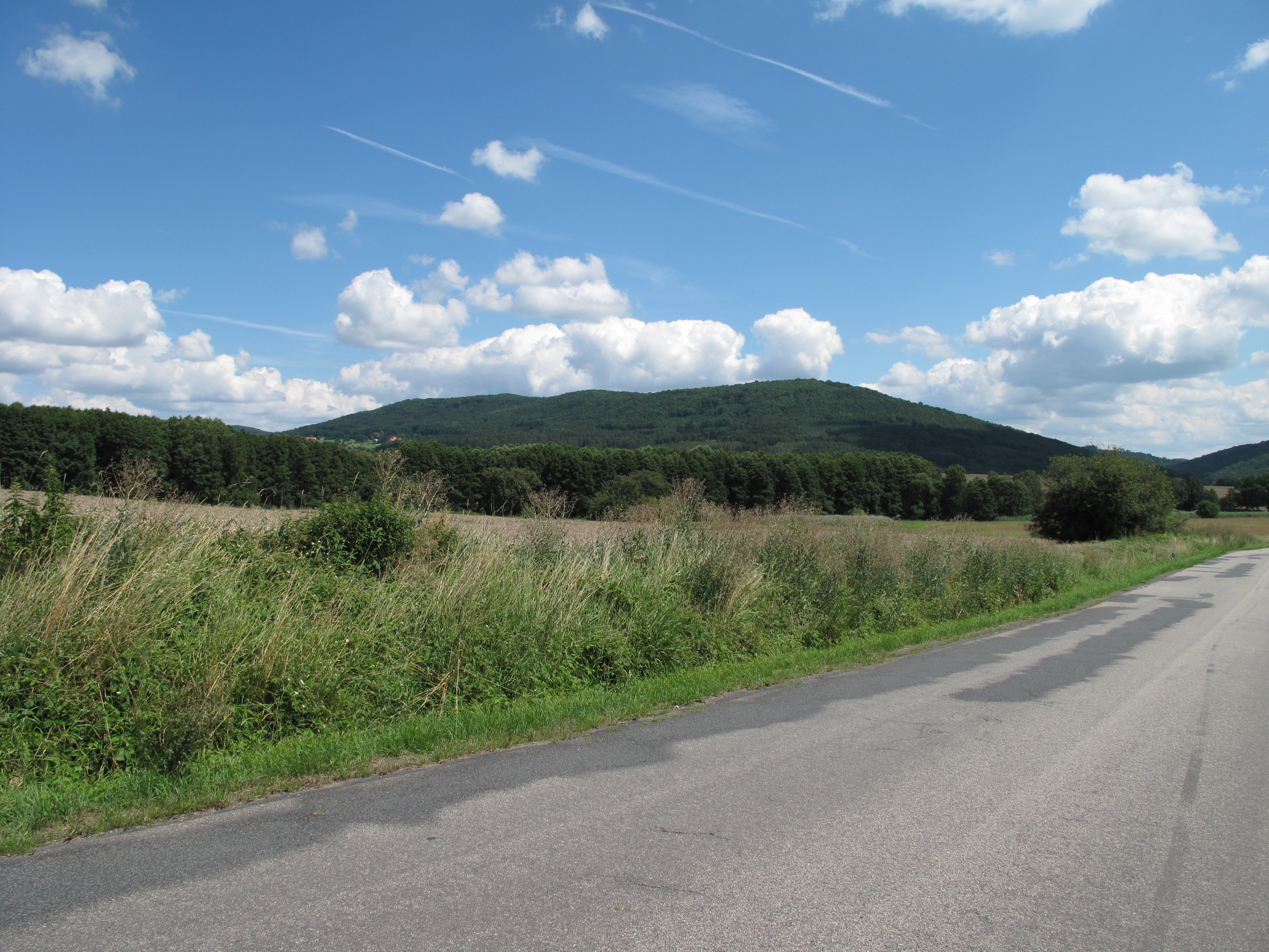 Přírodní rezervace Bělyšov, okres Klatovy, Česká republika.